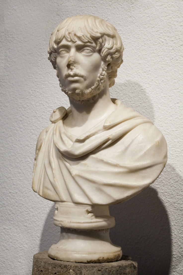 Retrato romano de un particular hallado al construir la carretera de Medina de Rioseco a Villalba de los Alcores. Siglo II d.C.